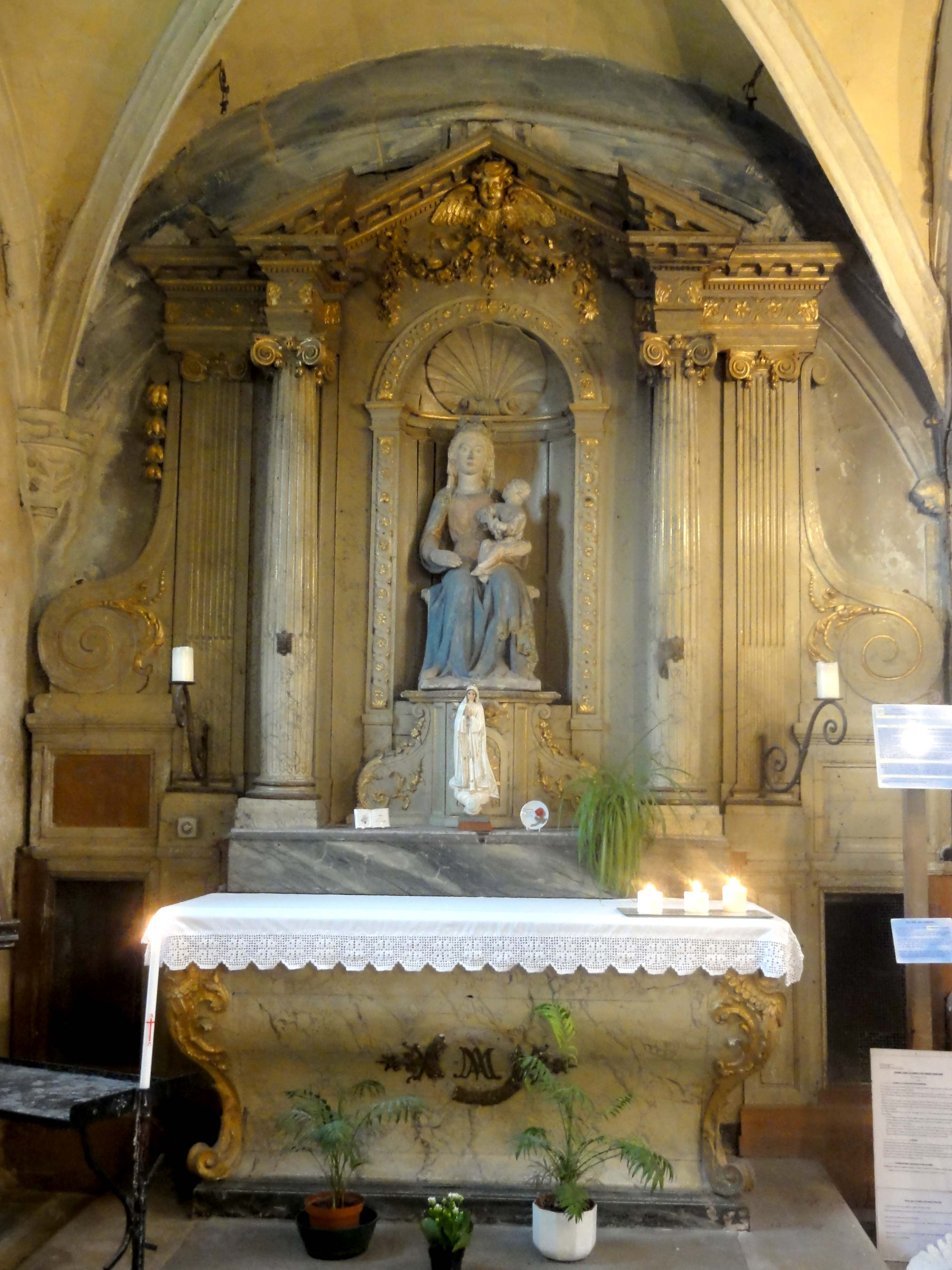 Autel et retable de la Vierge.